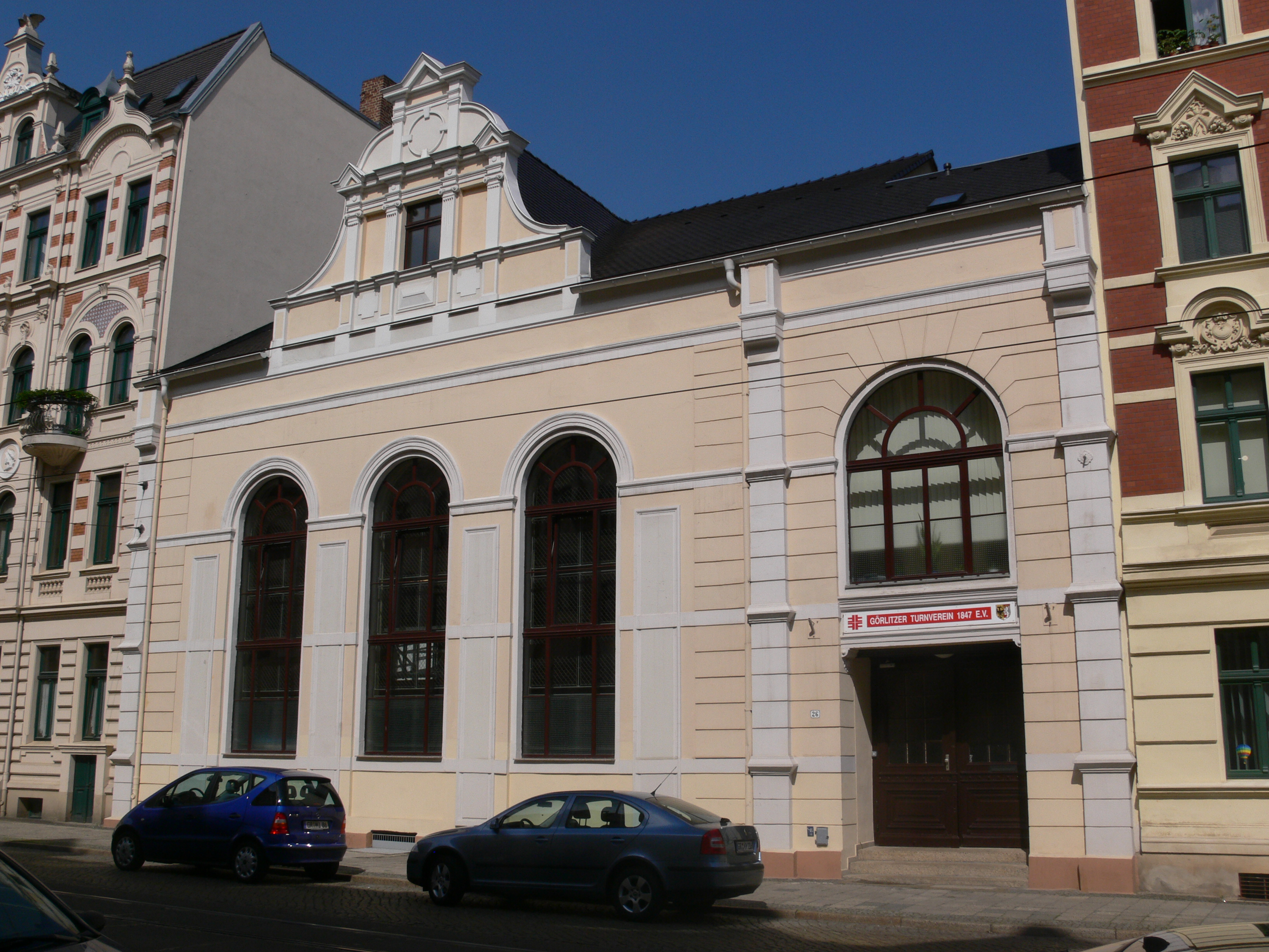 Görlitz, Sachsen Turnhalle in der Kunnerwitzer Straße